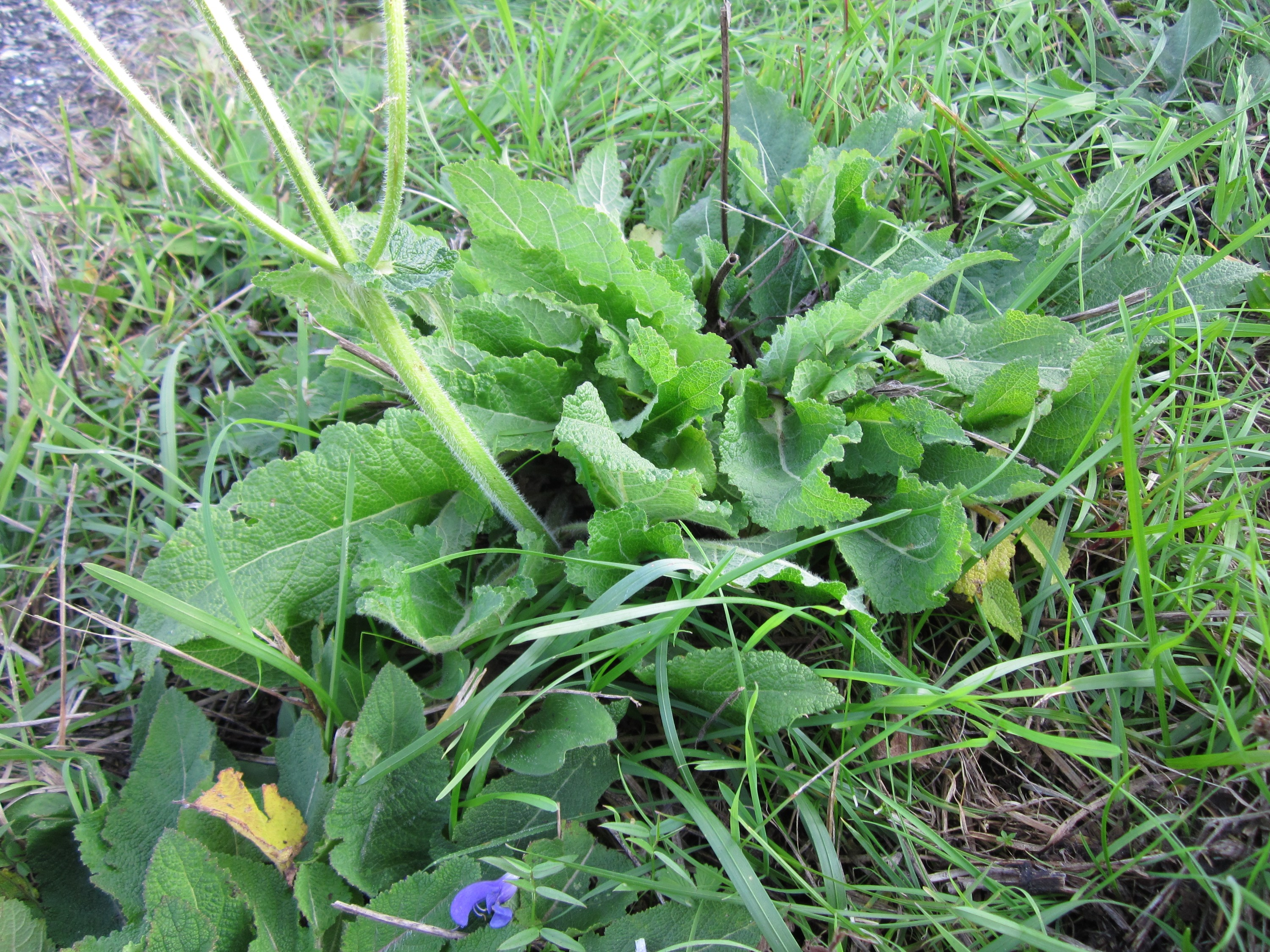 Wiesensalbei (Salvia pratensis) im Hockenheimer Rheinbogen